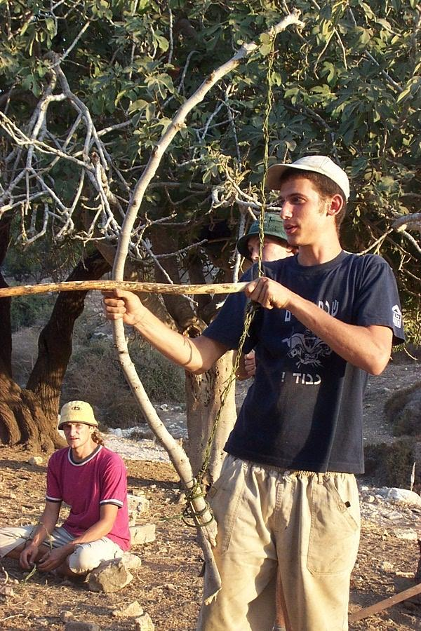 Bow